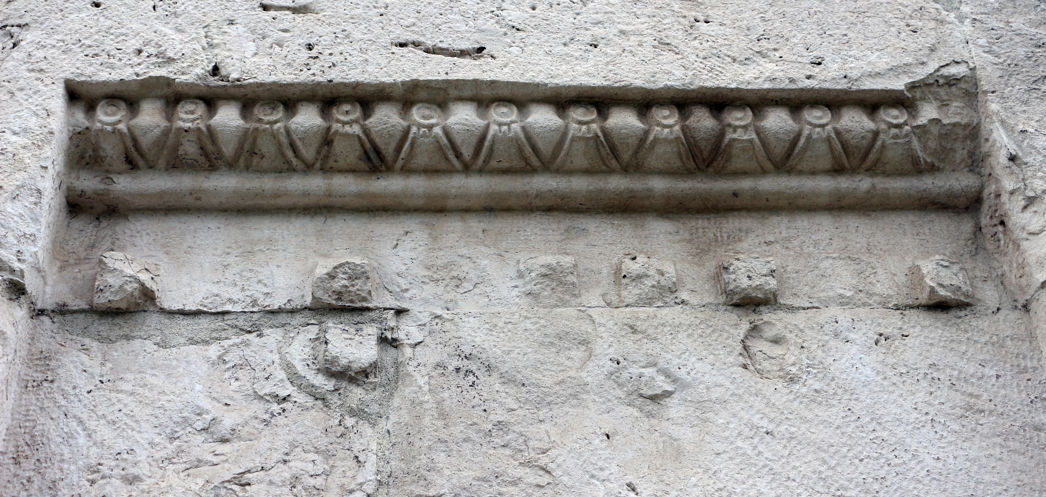 Mausoleo di Teodorico This is a photo of a monument which is part of cultural heritage of Italy.